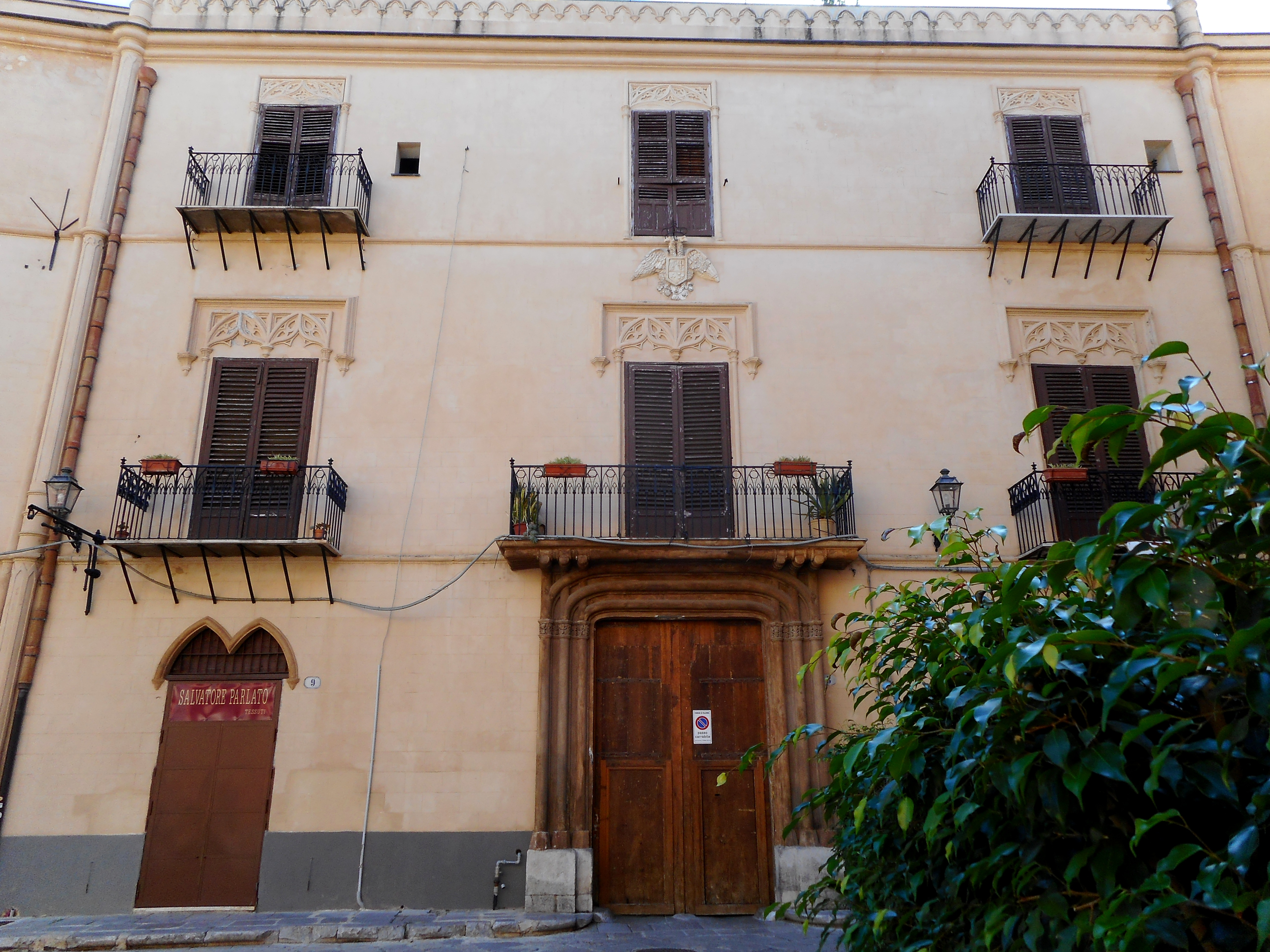 Fronte principale di Palazzo Lucchesi Palli in piazza Croce dei Vespri